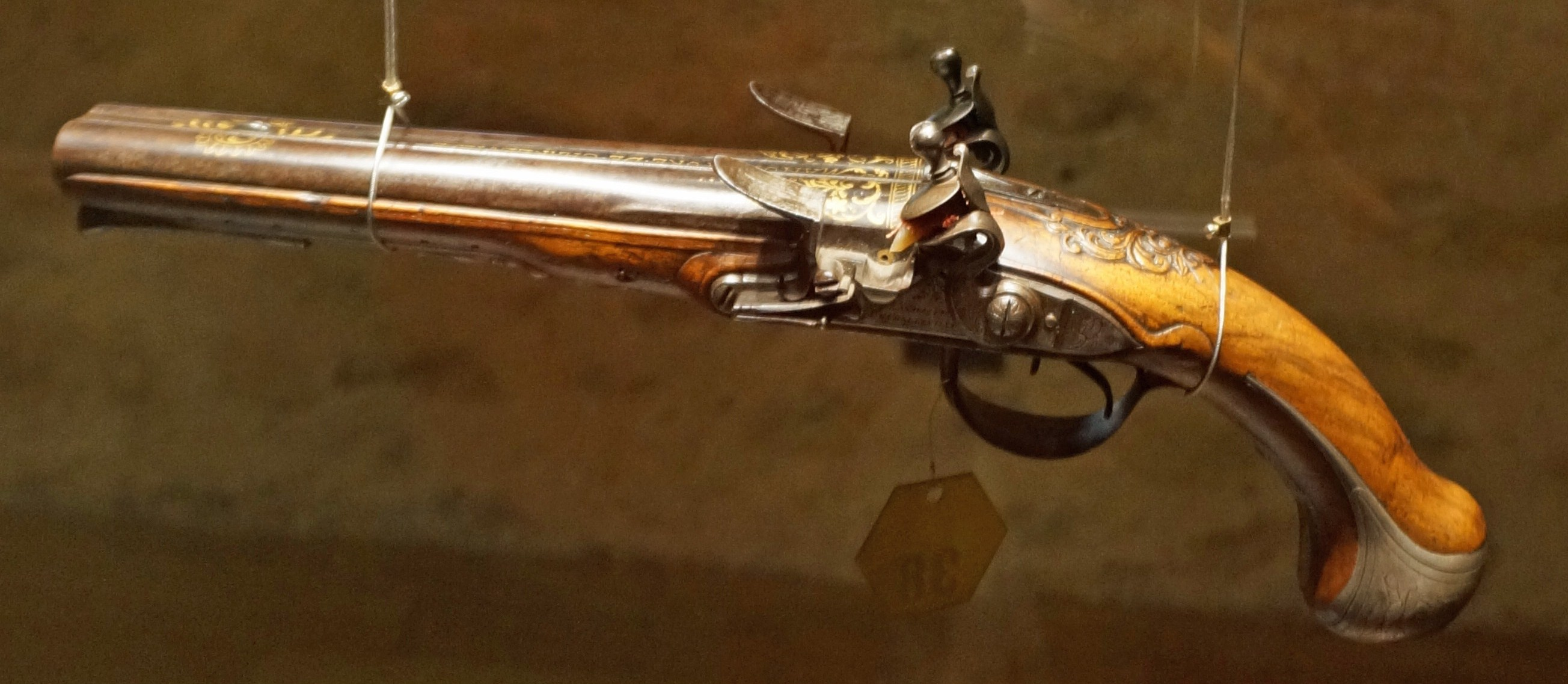 Présenté au musée de l'Ardenne .